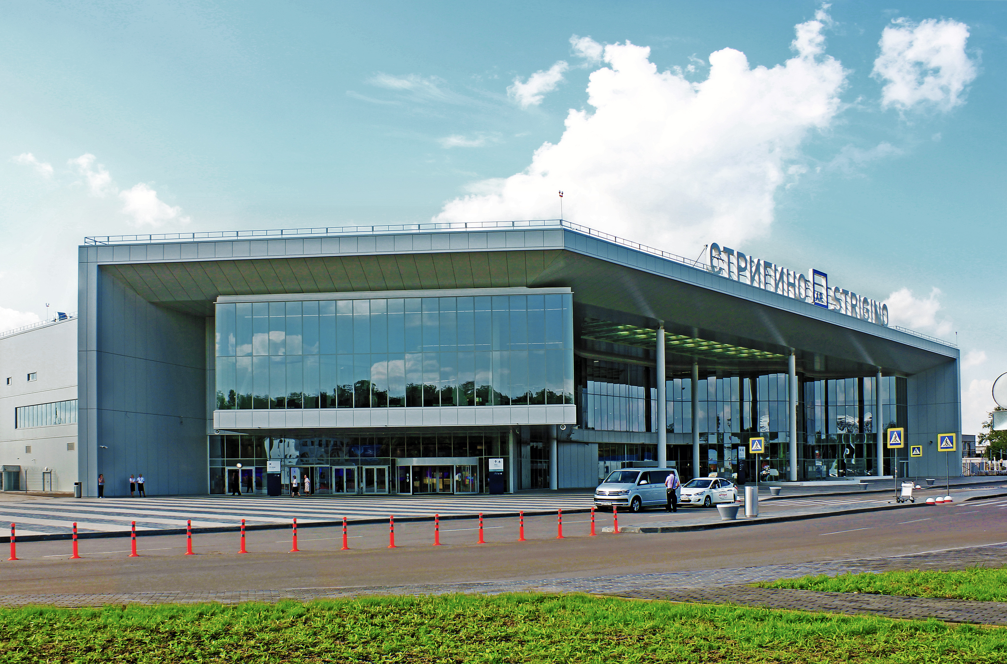 Новый терминал нижегородского аэропорта "Стригино".